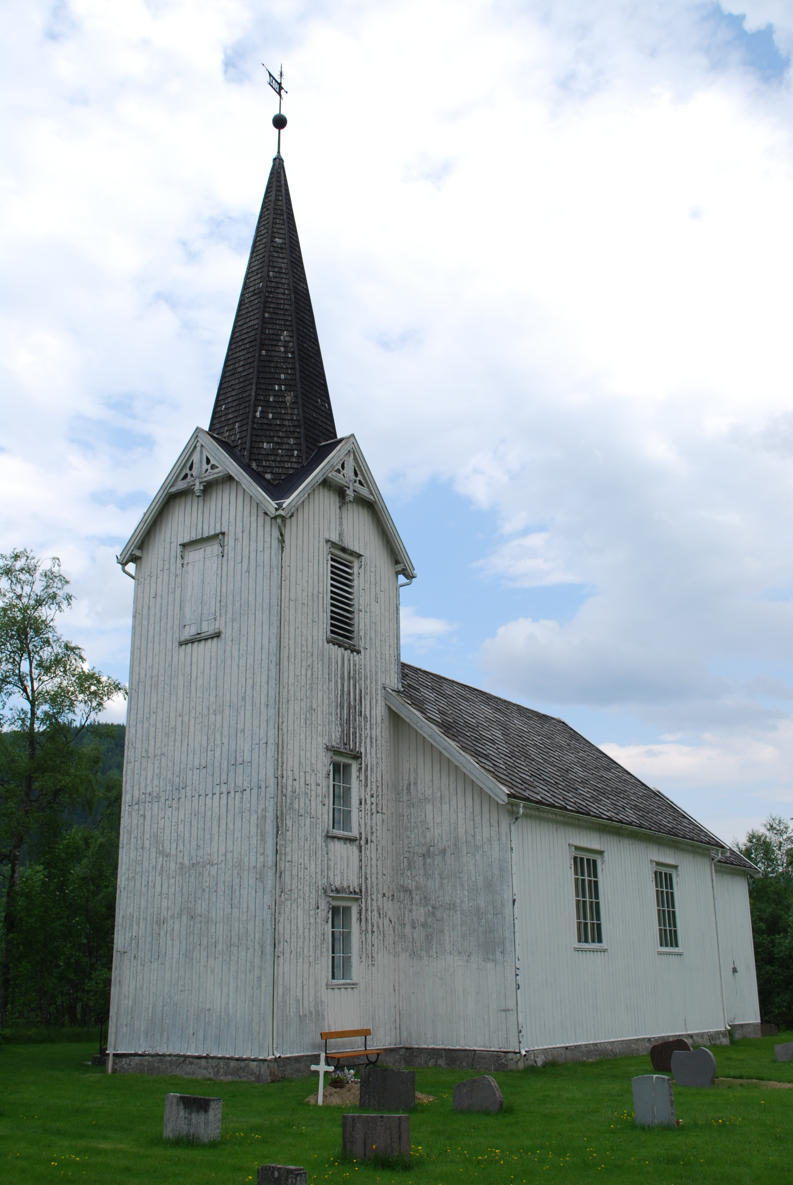 Floren kapell i Stjørdal, Nord-Trøndelag.